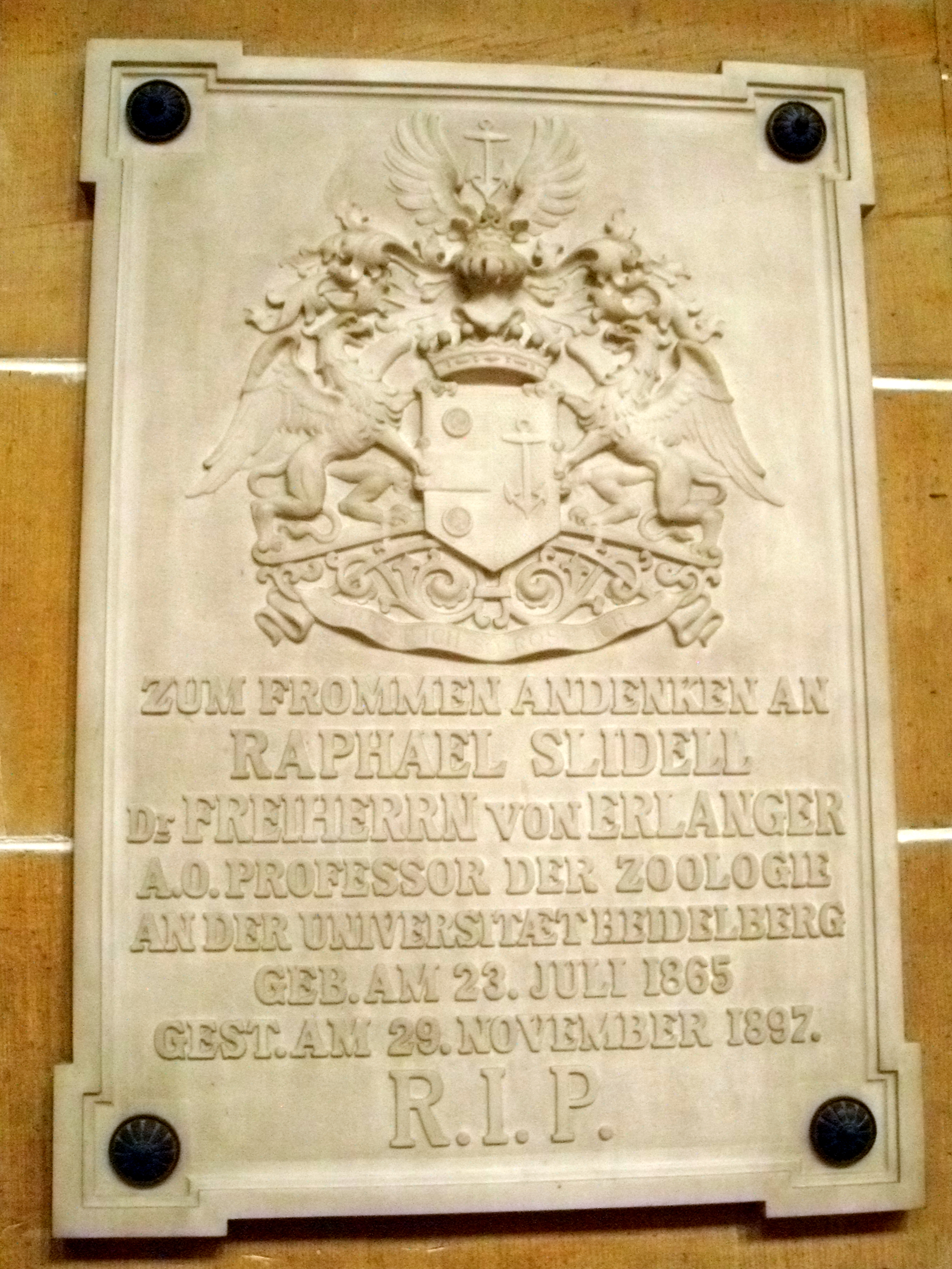 St. Raphael ist eine katholische Kirche im Heidelberger Stadtteil Neuenheim. Sie wurde in den Jahren 1903 bis 1905 im neuromanischen Stil errichtet und ist dem Erzengel Raphael geweiht.